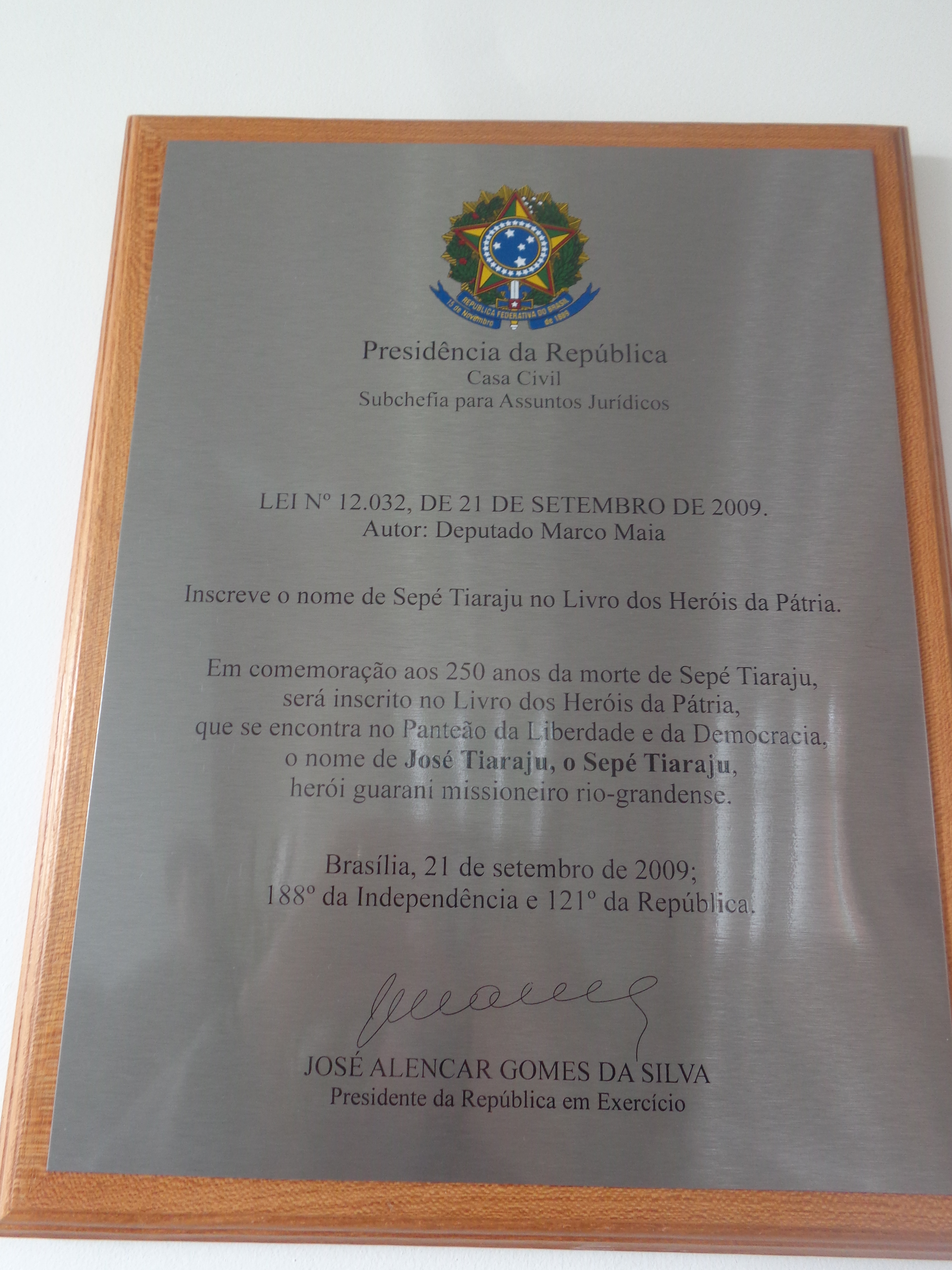 Placa comemorativa exposta na Usina Termelétrica Sepé Tiaraju em Canoas, RS.